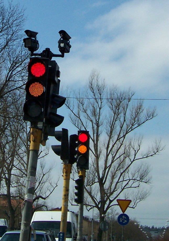 Traffic camera / trafikkamera Stockholm Sweden